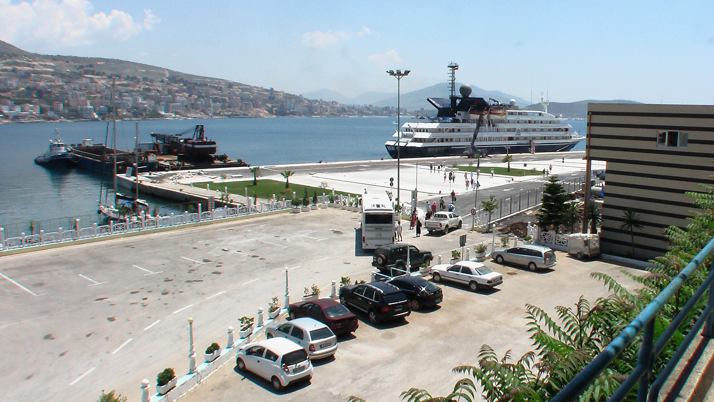 Der Hafen von Sarandë